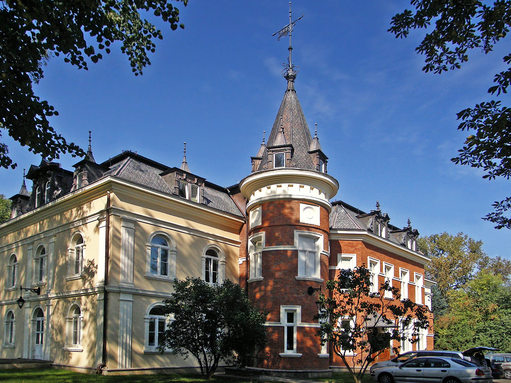 Białystok, ul. Dojlidy Fabryczne 23 - Pałac Hasbacha (zabytek nr A-134 z 8.12.1981 i z 18.12.1986)